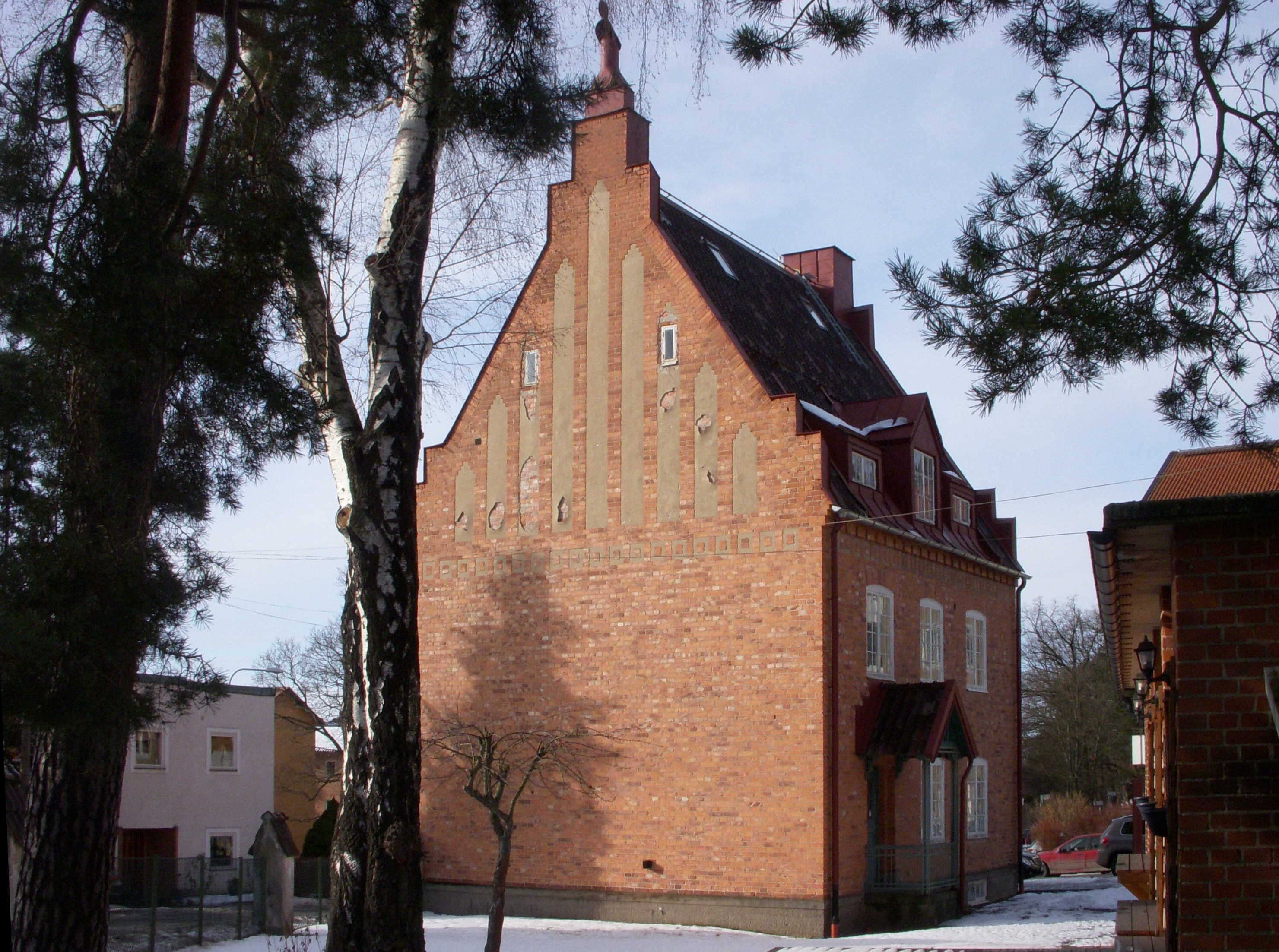 Lillsjöstationen (boningshus) i Ulvsunda byggd 1913 efter ritningar av Gustaf de Frumerie.